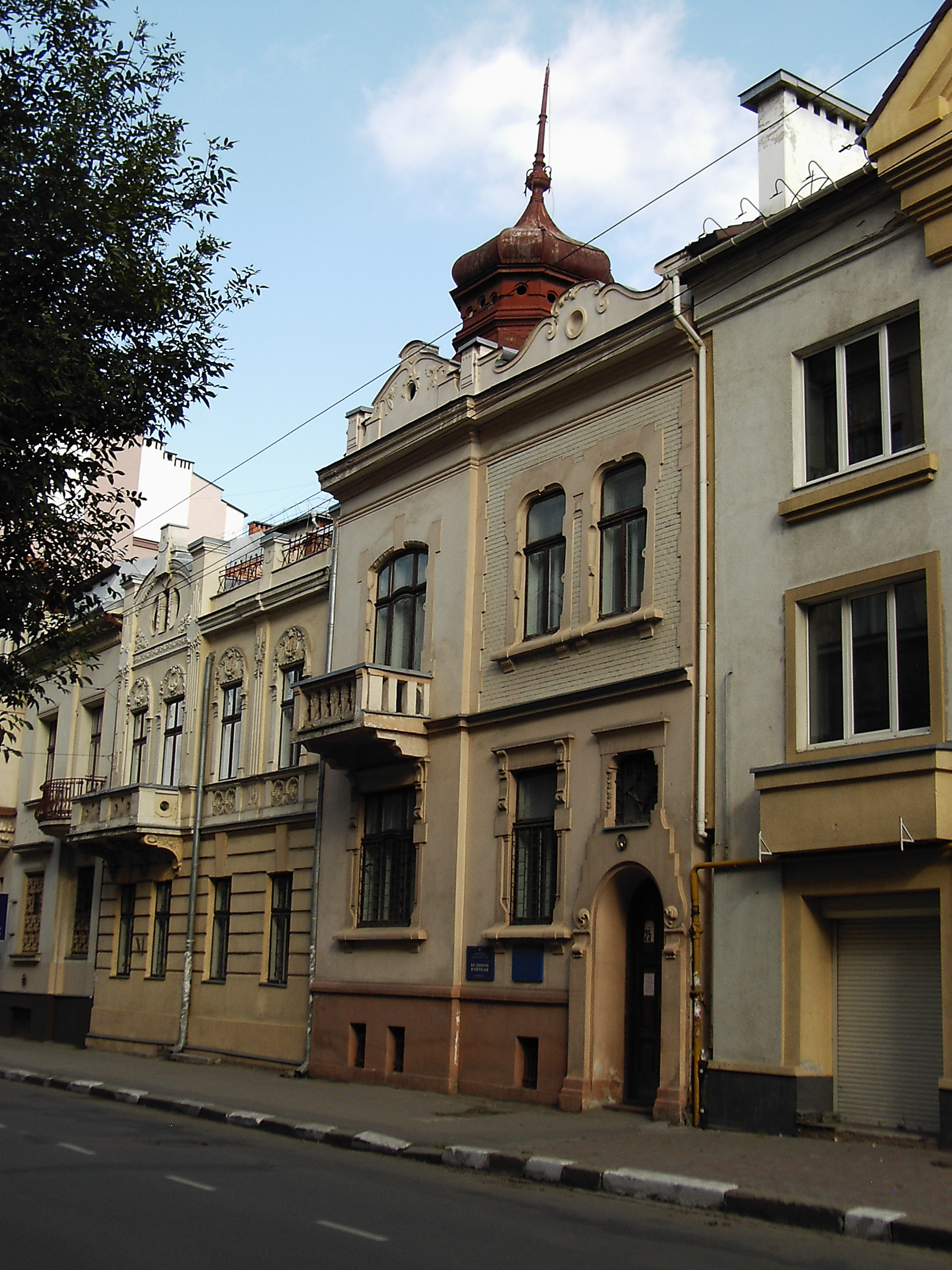 Івано-Франківська Державна Дитяча Художня Школа. Управління Освіти і Науки, Будинок Вчителя. м. Івано-Франківськ, вулиця Чорновола, 25.